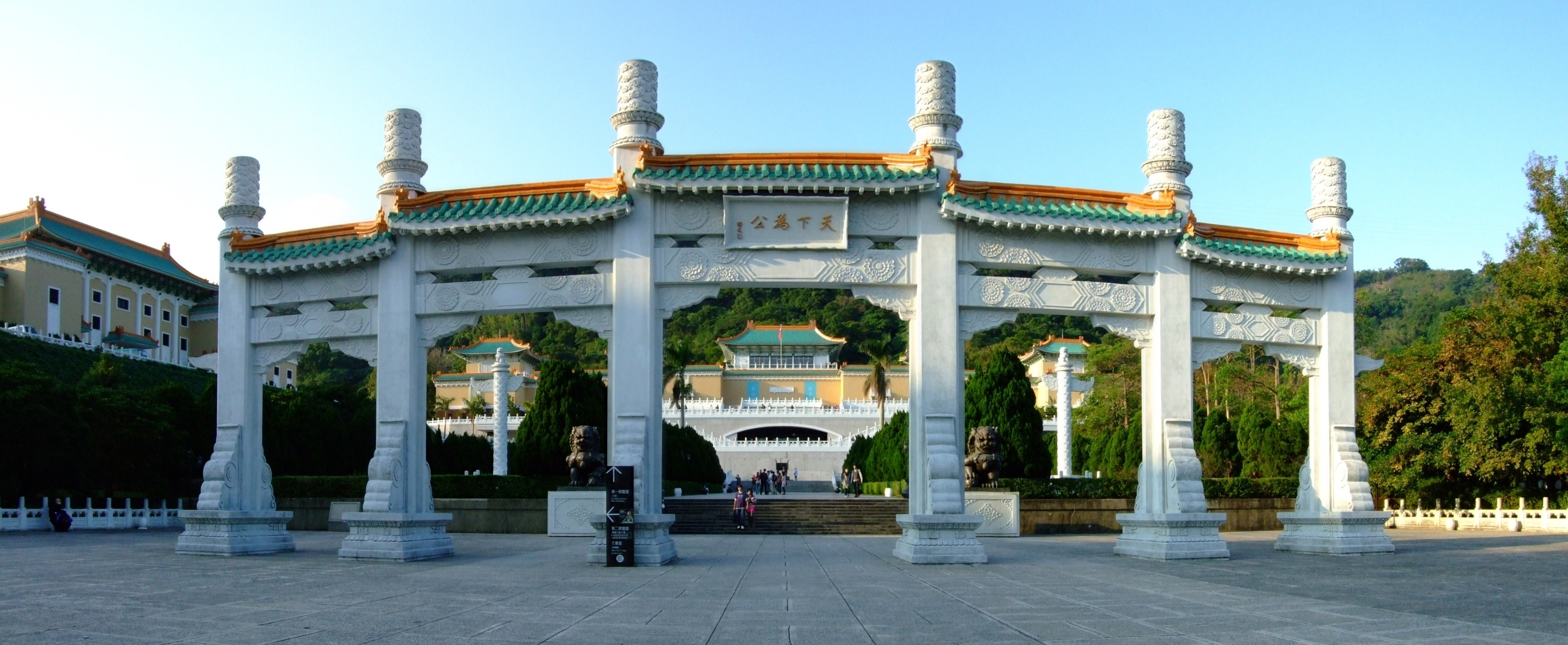 國立故宮博物院入口全景